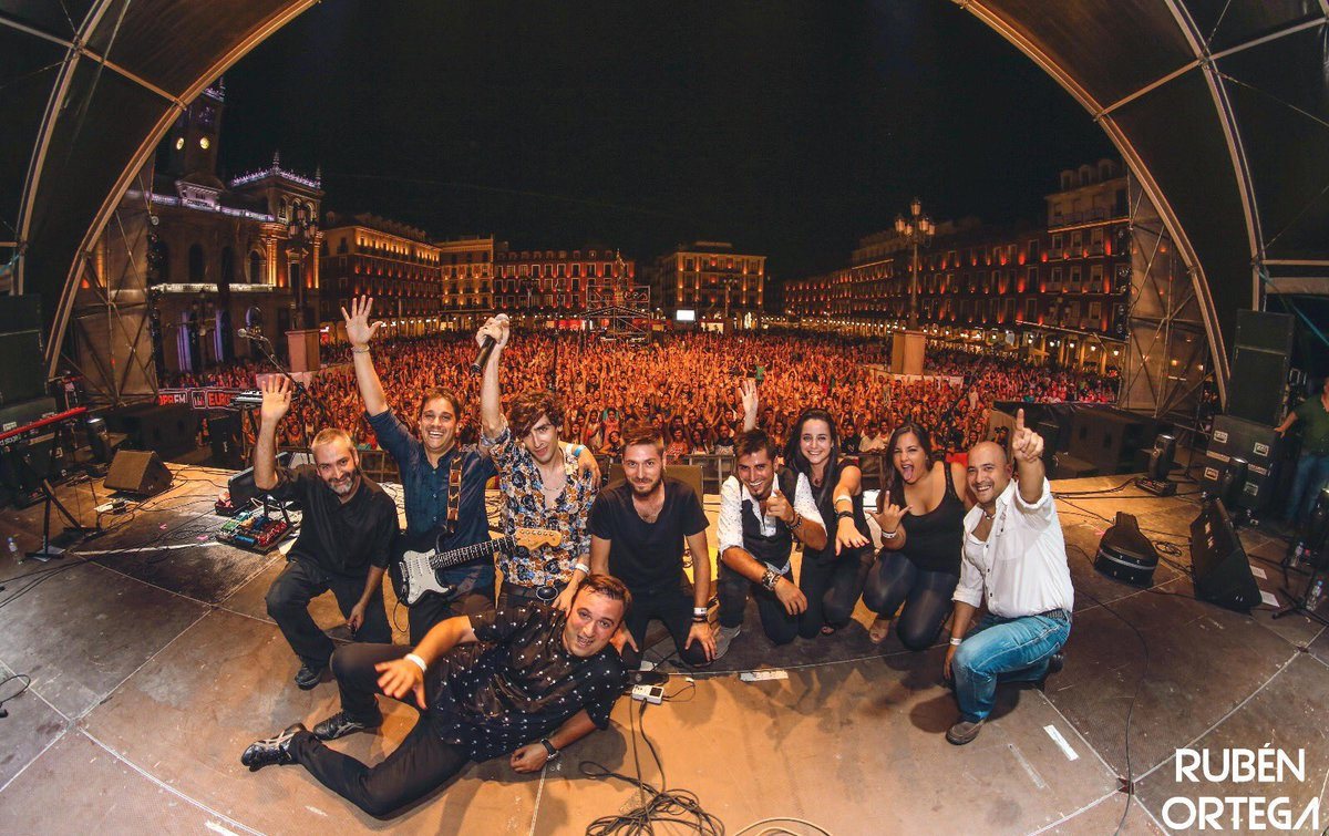 Fotografía del grupo Sharon Bates tras un concierto en Valladolid